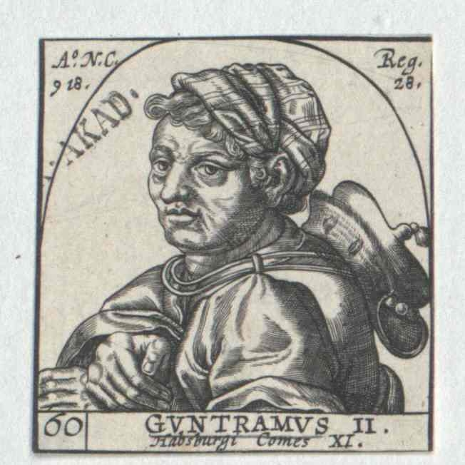 Guntram der Reiche